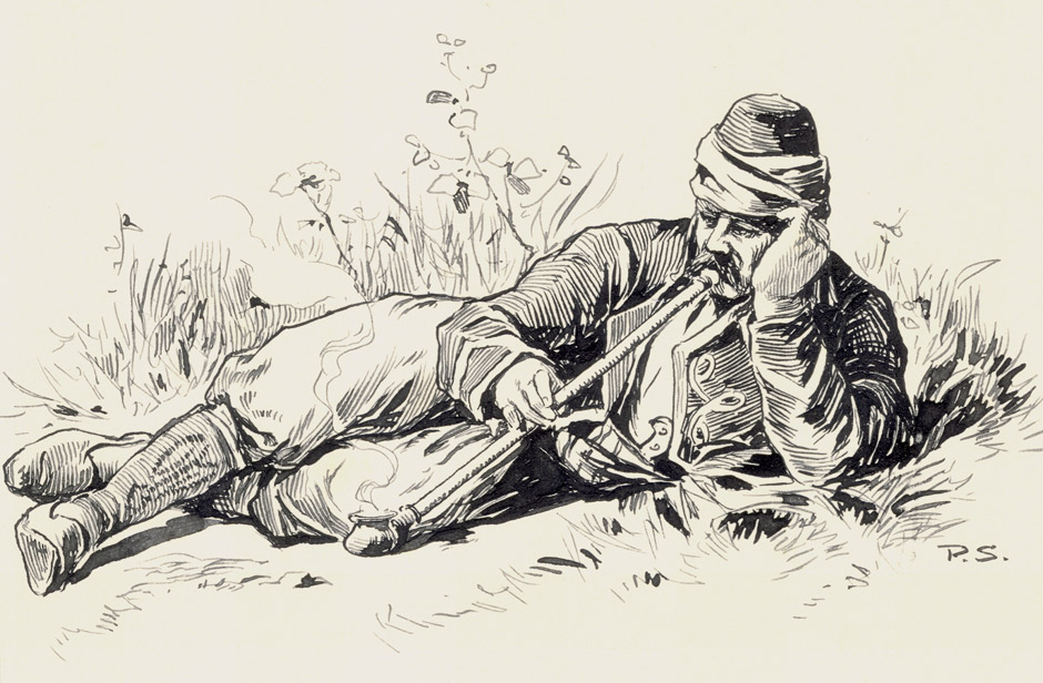 Vorlage zu einer Illustration zu Karl May: In den Schluchten des Balkan, illustrierte Ausgabe 1908, Seite 418 Kawaß - Polizist des Großherrn. Federzeichnung No 17 in schwarzer Tusche, auf Karton. Monogrammiert: "P.S.". Bildgröße: 8 x 13,5 cm. Kartongröße: 20 x 19,8 cm.